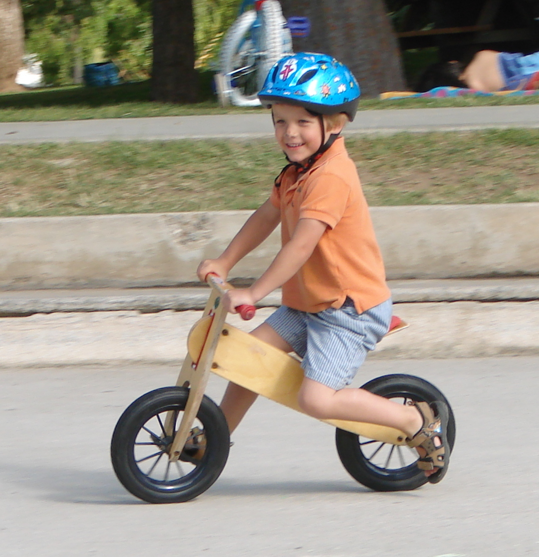 Manufacturer: LIKEaBIKE en: Kids balance bike de: Kinderlaufrad